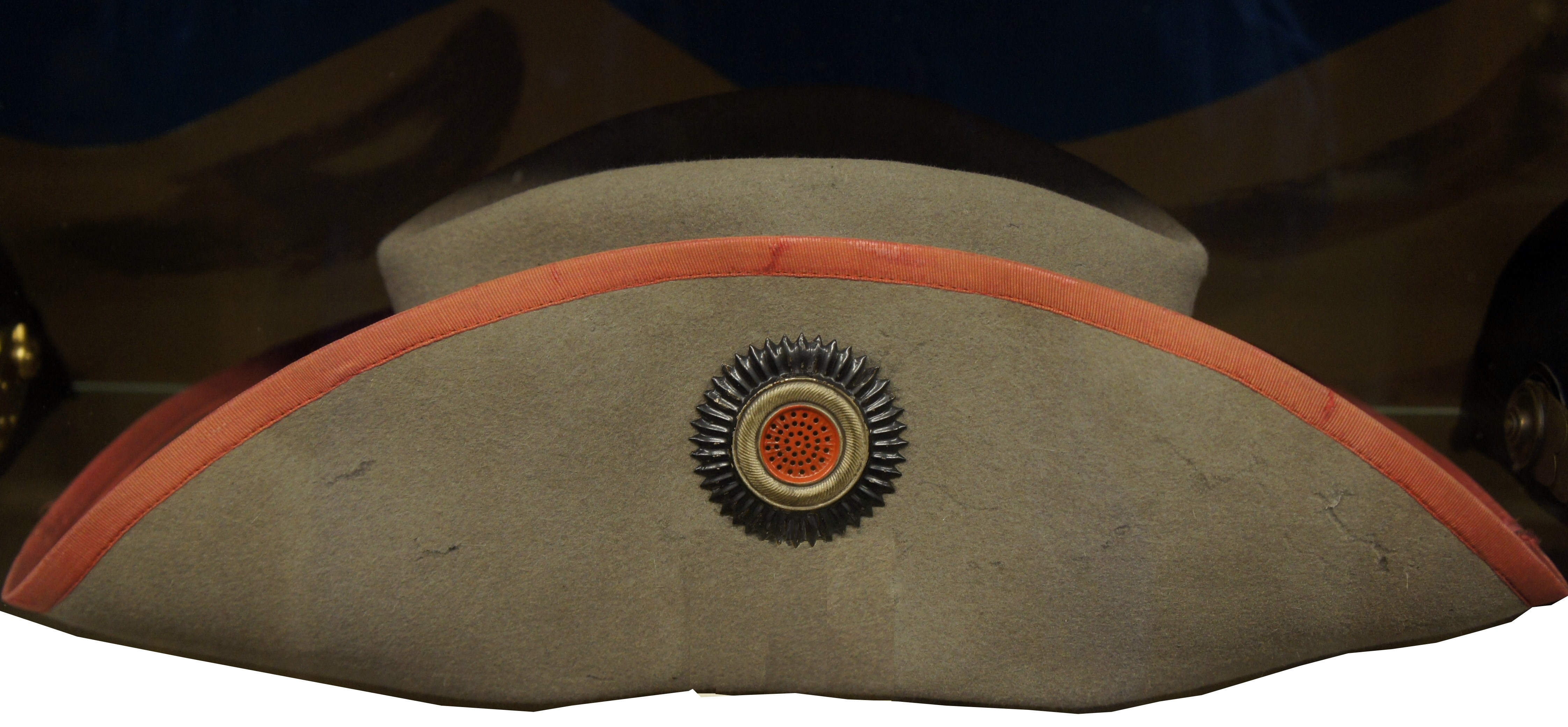 Couvre chef des Schutztruppen du Cameroun, collection du fort de la Pompelle .